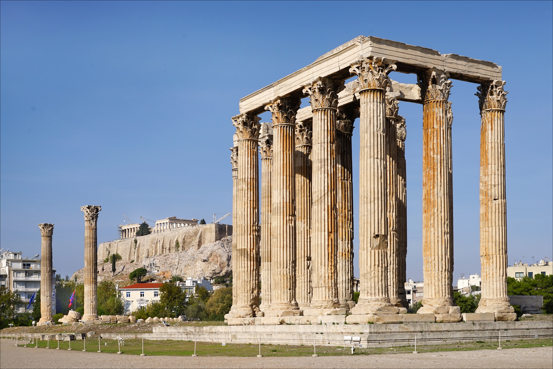 L'Olympieion était un temple dédié à Zeus qui a été commencé en 515 av. J.-C. mais qui n'a été terminé qu'à l'époque romaine sous l'empereur Hadrien en 131. Cet empereur romain était un amateur d'art grec mais aussi de jeunes éphèbes comme Antinoüs. Au fond, on voit le versant sud de l'Acropole et du Parthénon.